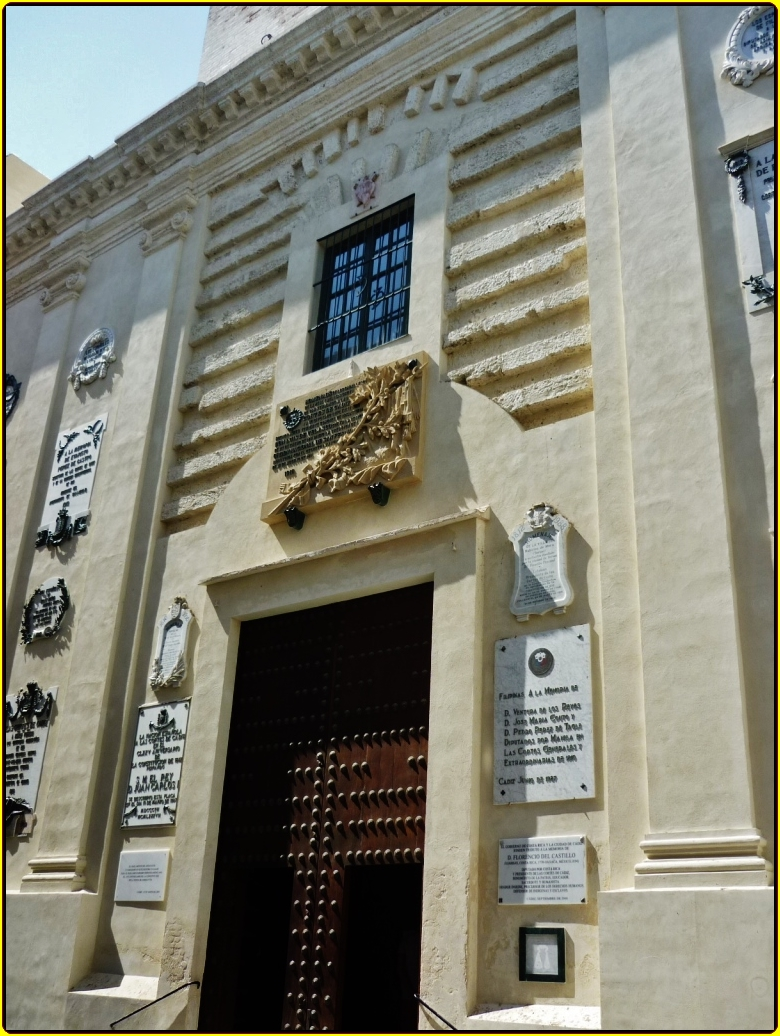 Fotos por Cortesia de Alejandro Blanco Álbum 3105 By Catedrales e Iglesias